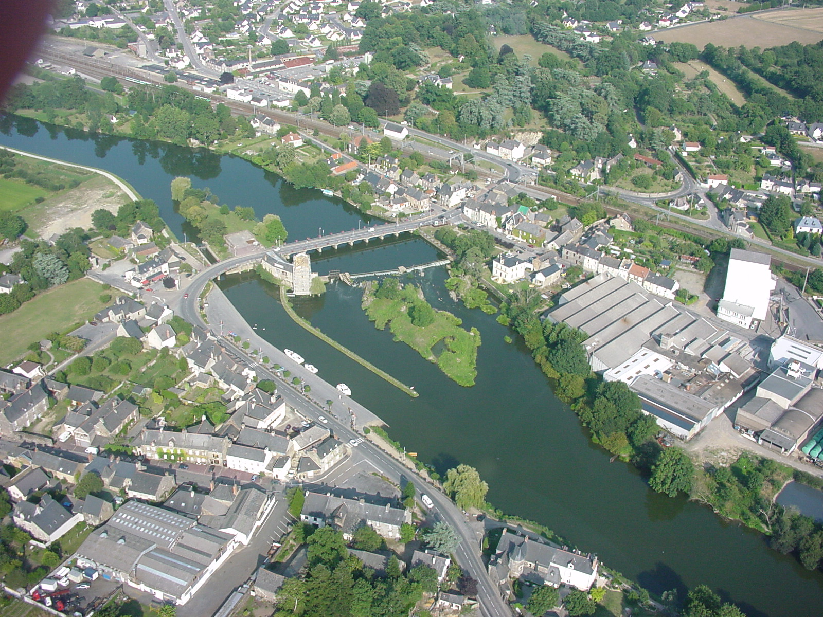 Photographie du port de Guipry-Messac d'hélicoptère